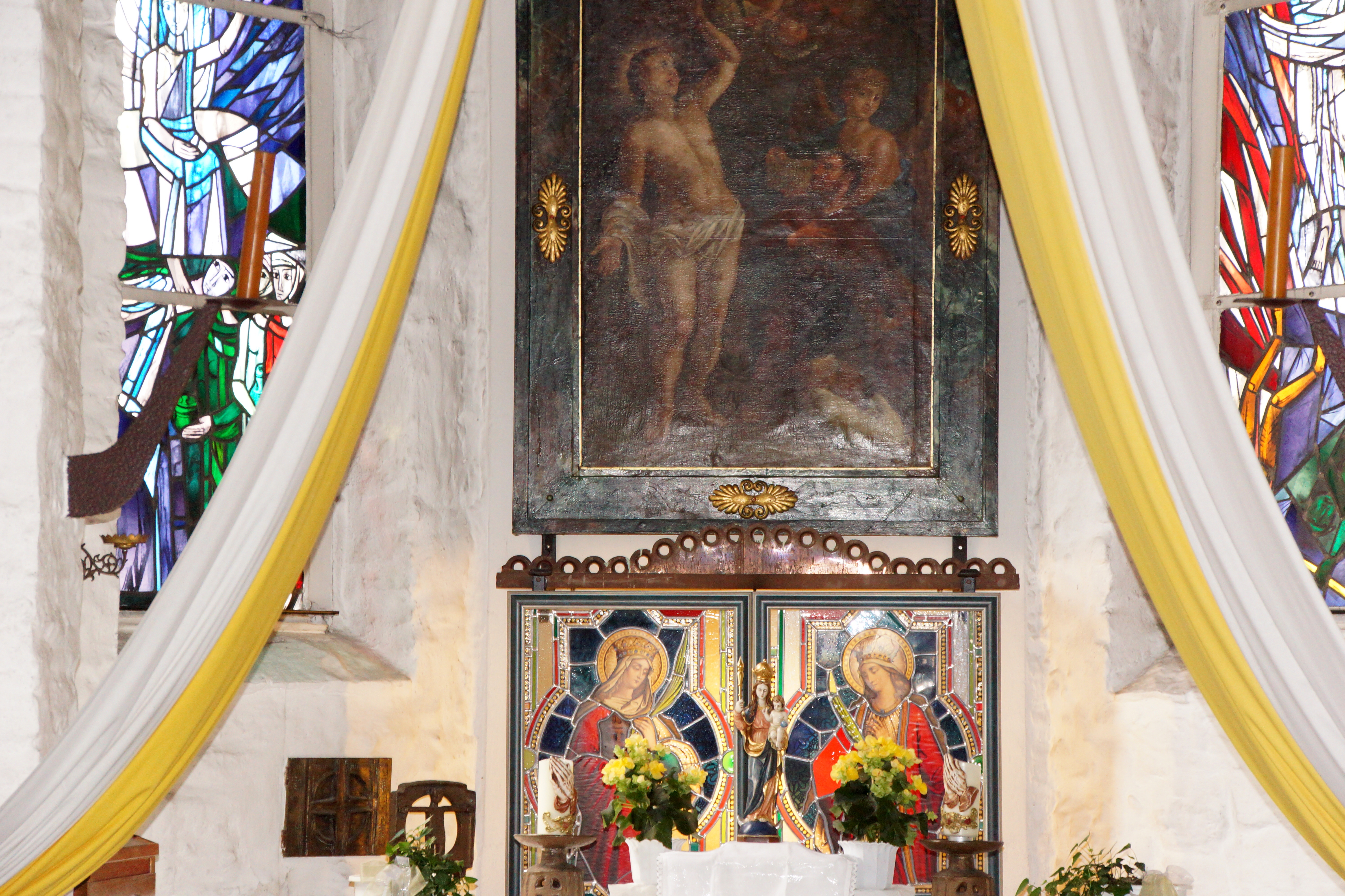 Die ehemalige Pestkirche St. Sebastian in Burglengenfeld